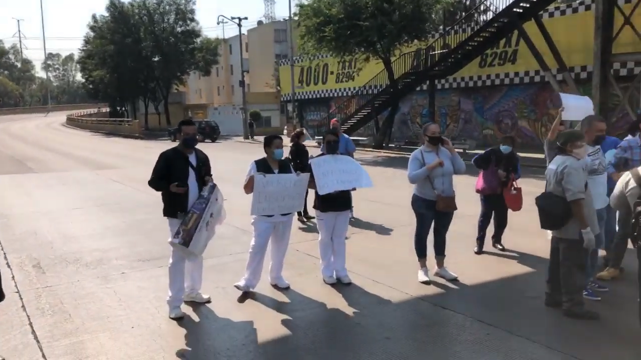 Médicos y enfermeras protestando en Circuito Interior por falta de insumos por COVID-19 en la Ciudad de México.